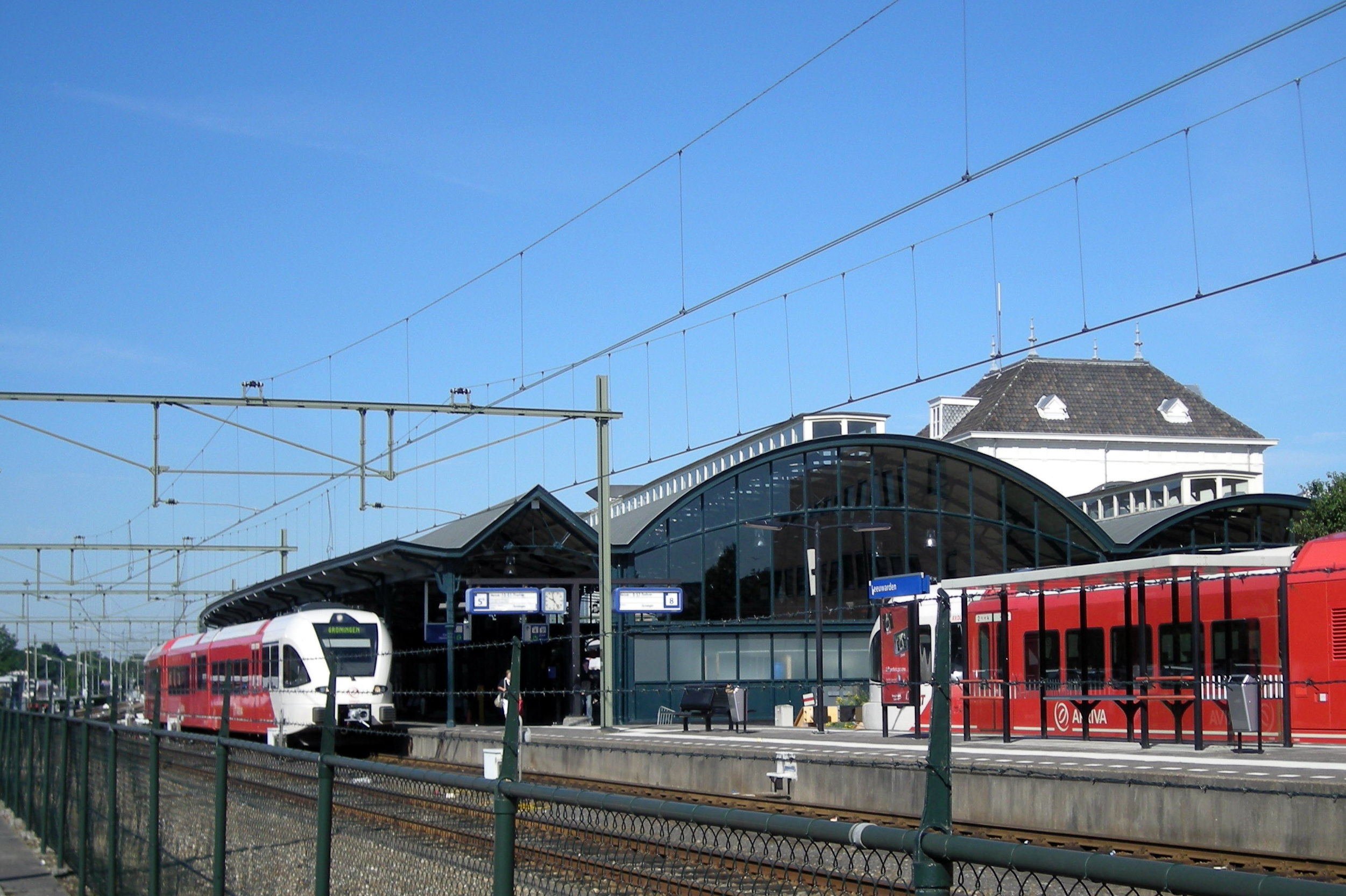 Station Leeuwarden met links de stoptrein naar Groningen en rechts de sneltrein naar Groningen